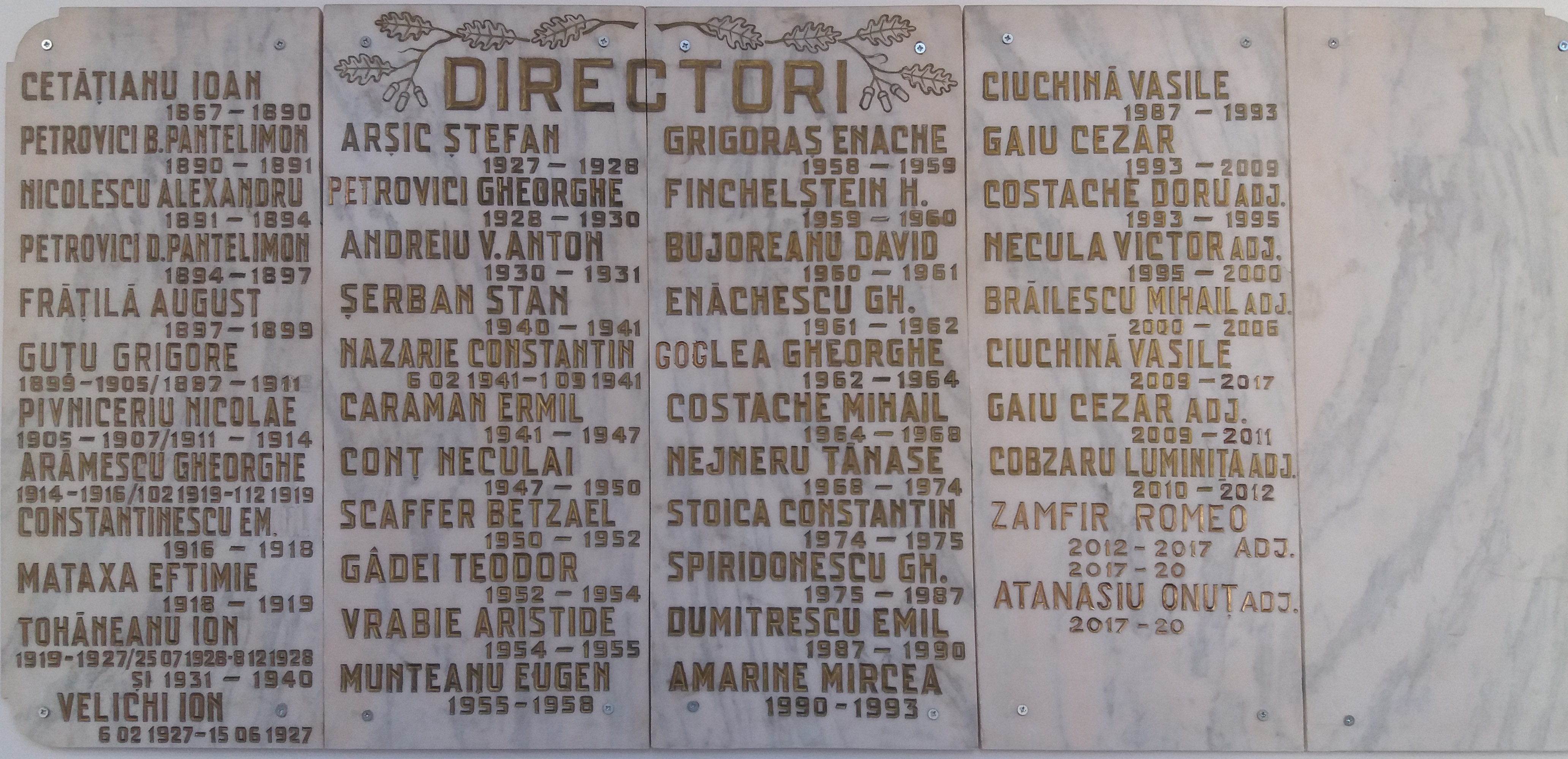 Lista directorilor Liceului Vasile Alecsandri din Galați